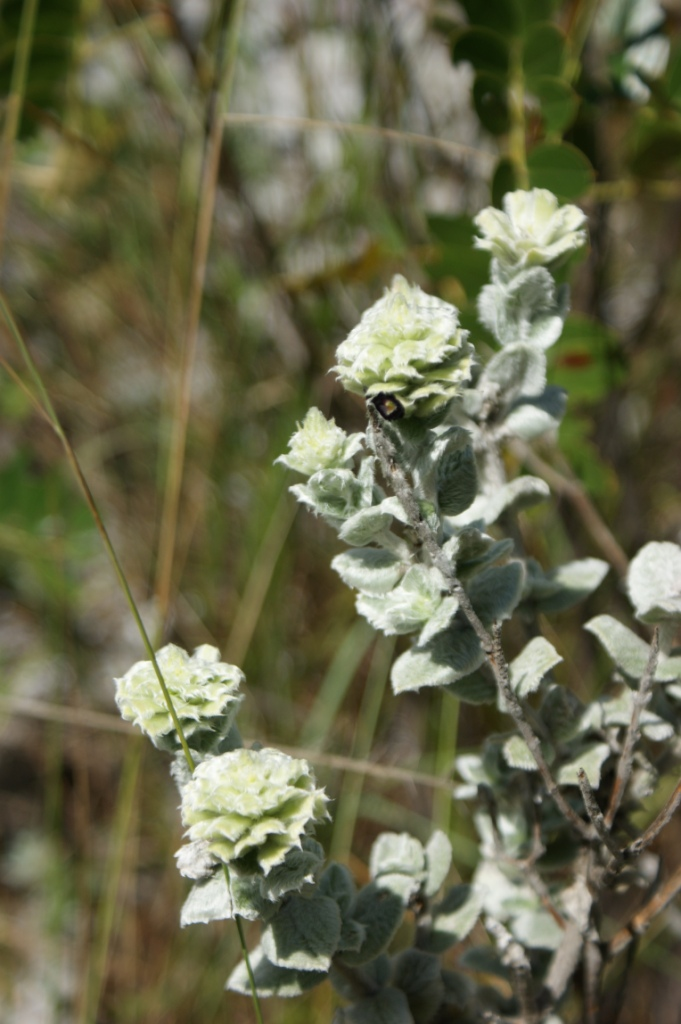 Stachytarpheta glauca - VERBENACEAE Parque Nacional da Chapada dos Veadeiros - Cavalcante - Goiás - Brasil.